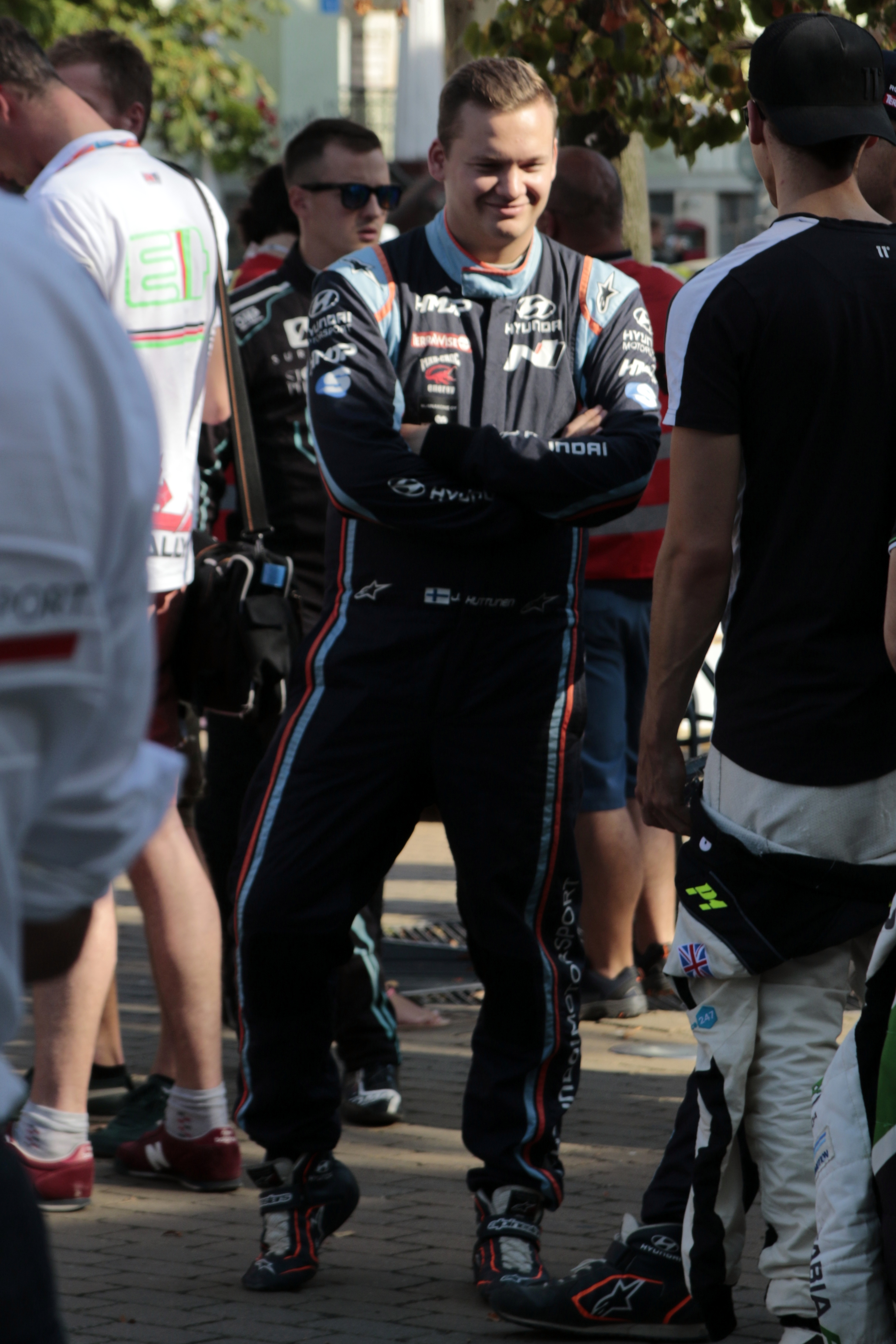 Rajd Polski 2018 - Jari Huttunen